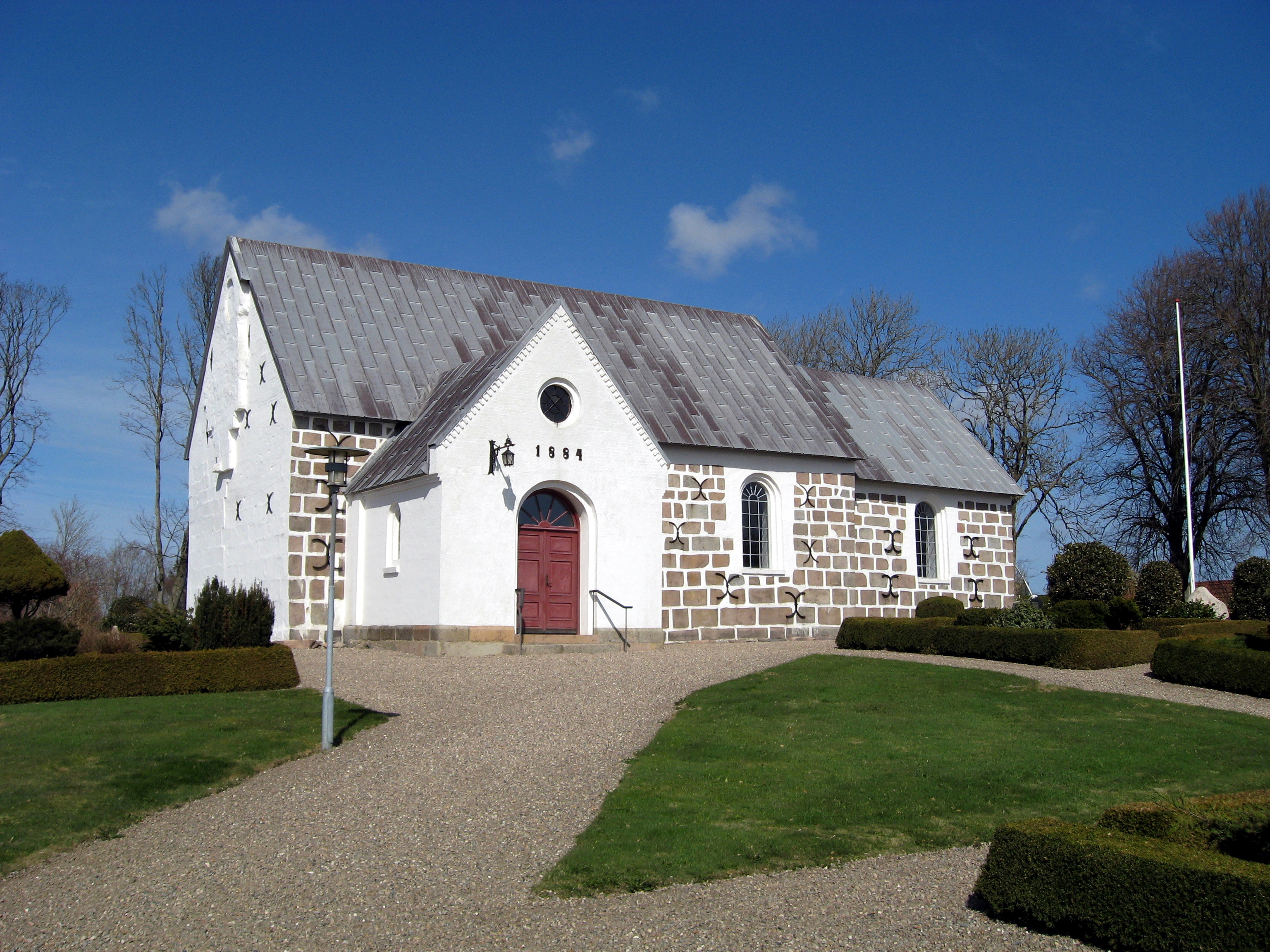 Skærum Kirke, Frederikshavn Kommune